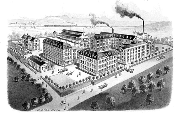 Das Walder Areal mit der Schuhfabrik Walder in den 1970er Jahren